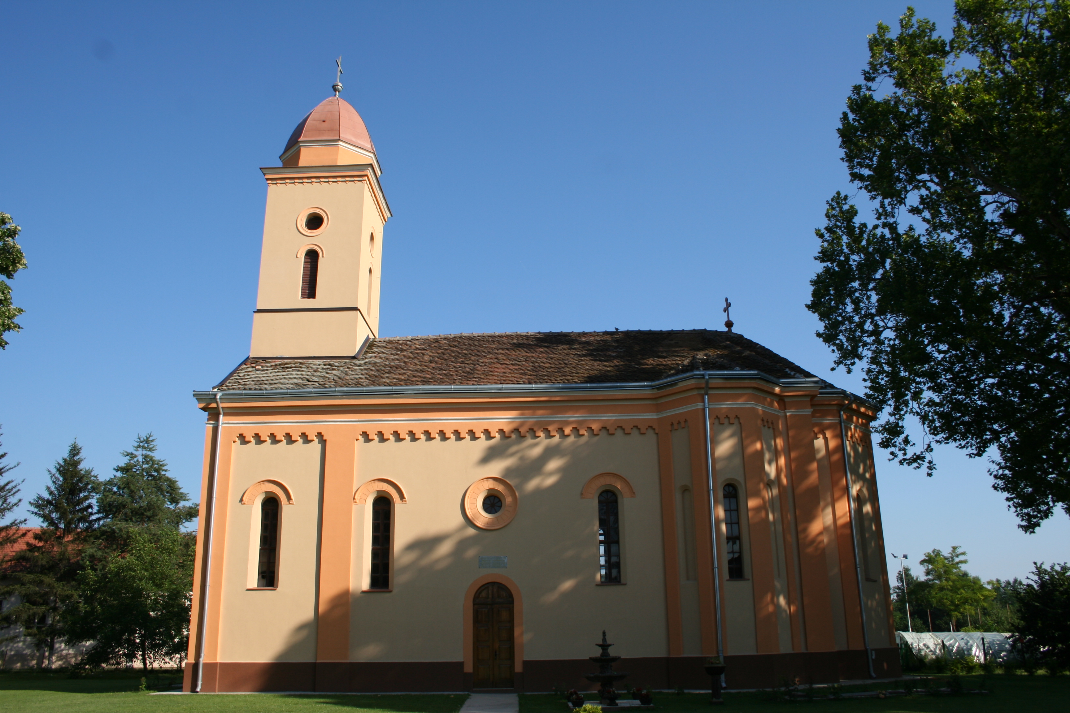 Crkva Sv. Georgija, Mačvanski Pričinović